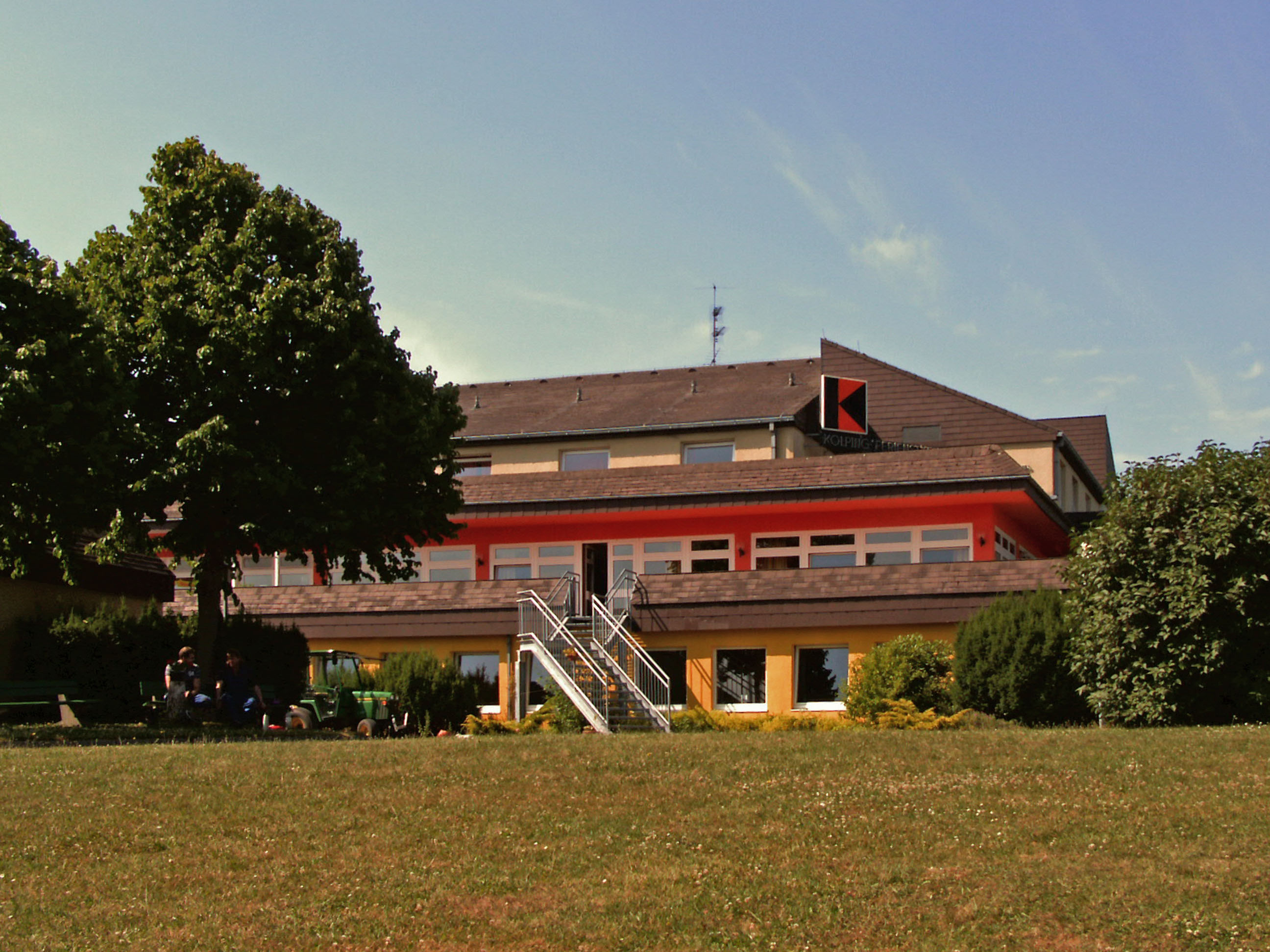 Kolping-Ferienparadies Pferdeberg bei Duderstadt, Landkreis Göttingen